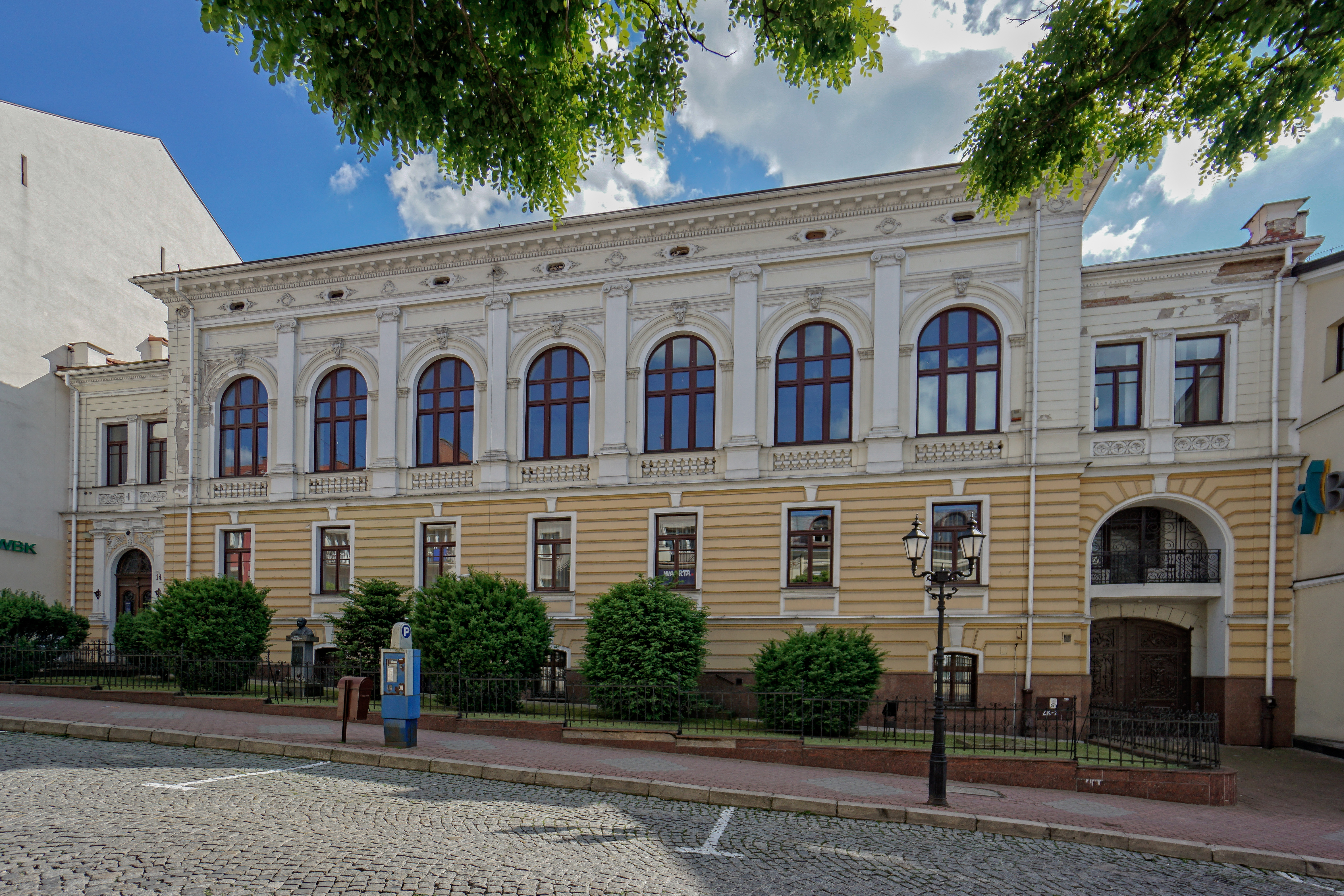 Łomża, dawny Bank Państwa, obecnie Kredyt Bank S.A. 11.1985.